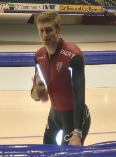 Zelfgemaakte foto tijdens het WK Sprint 2006 in Thialf